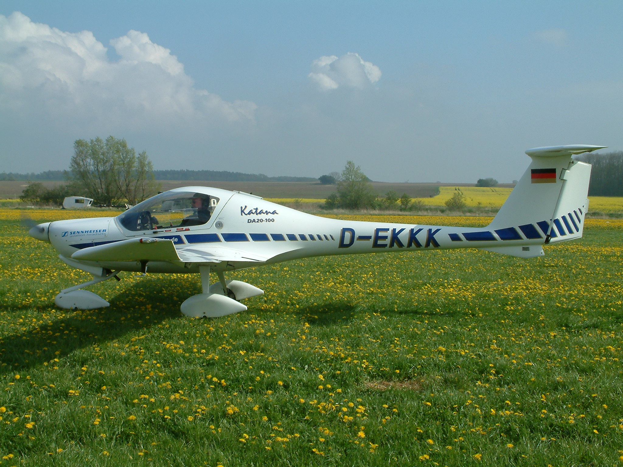 Katana DA20-100 - gerade gelandet in EDCR - Rerik